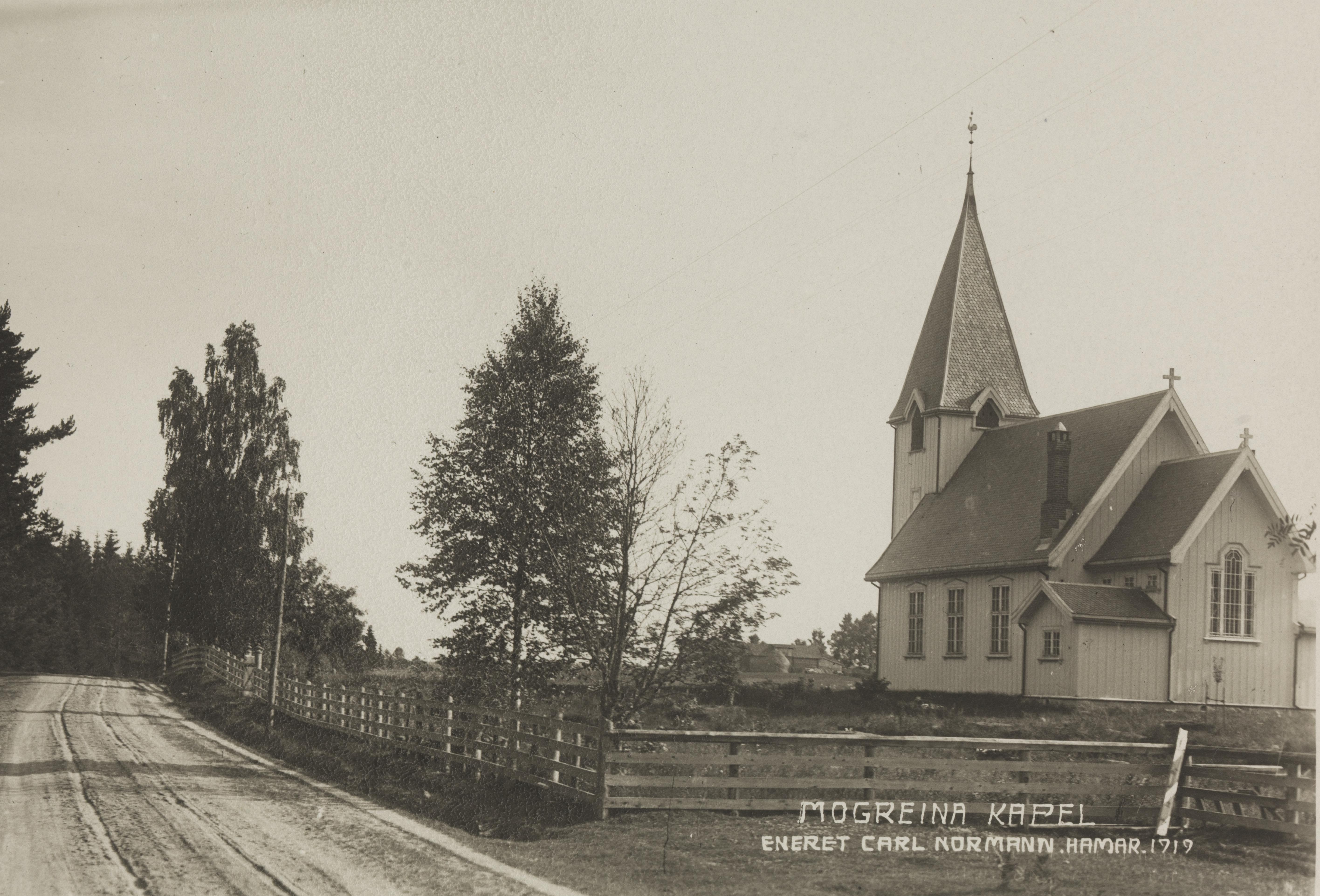 Bildet er hentet fra Nasjonalbibliotekets bildesamling Mogreina,Mogreina kirke, Ullensaker, Akershus